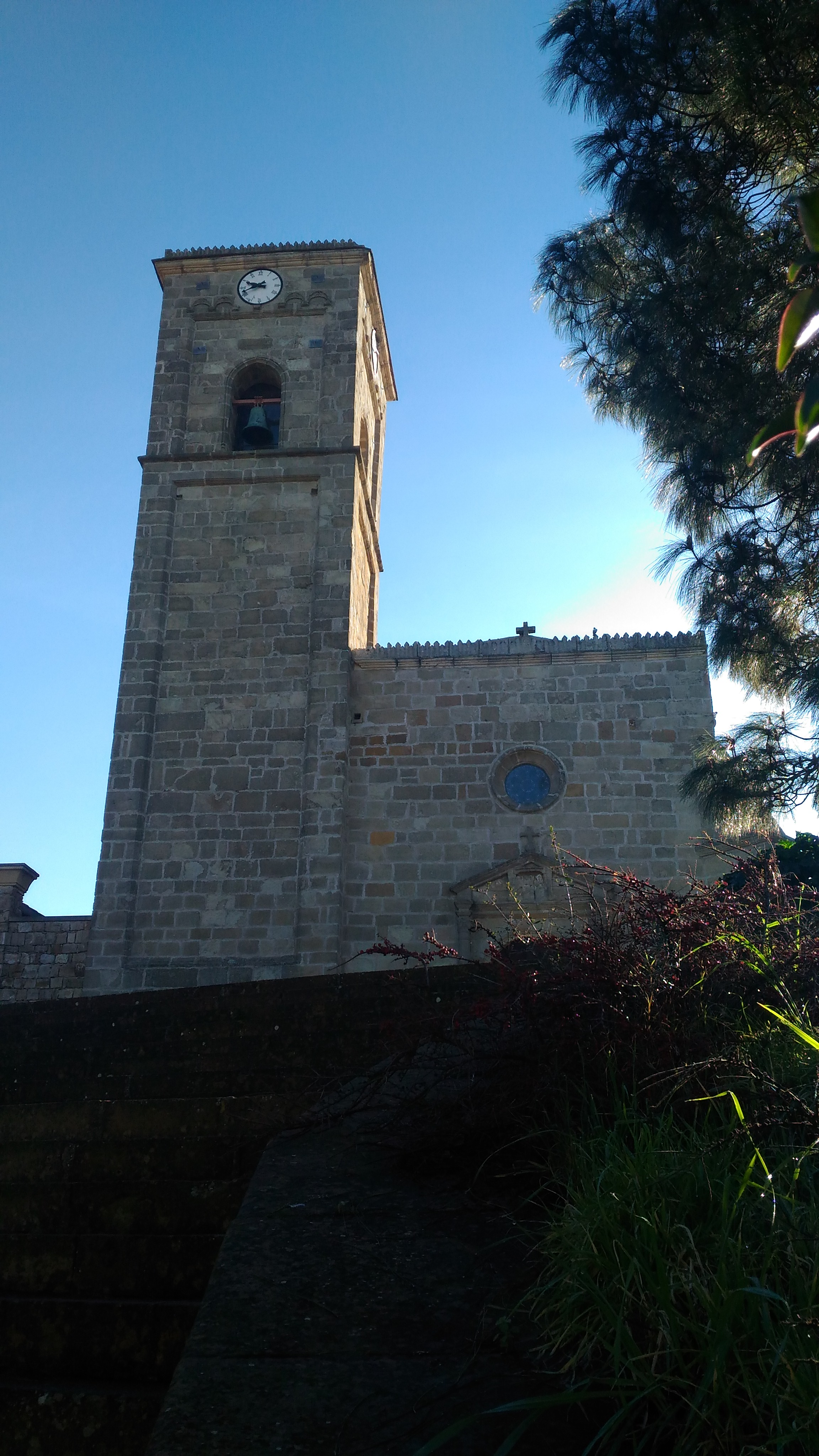 La chiesa si trova al centro del paese